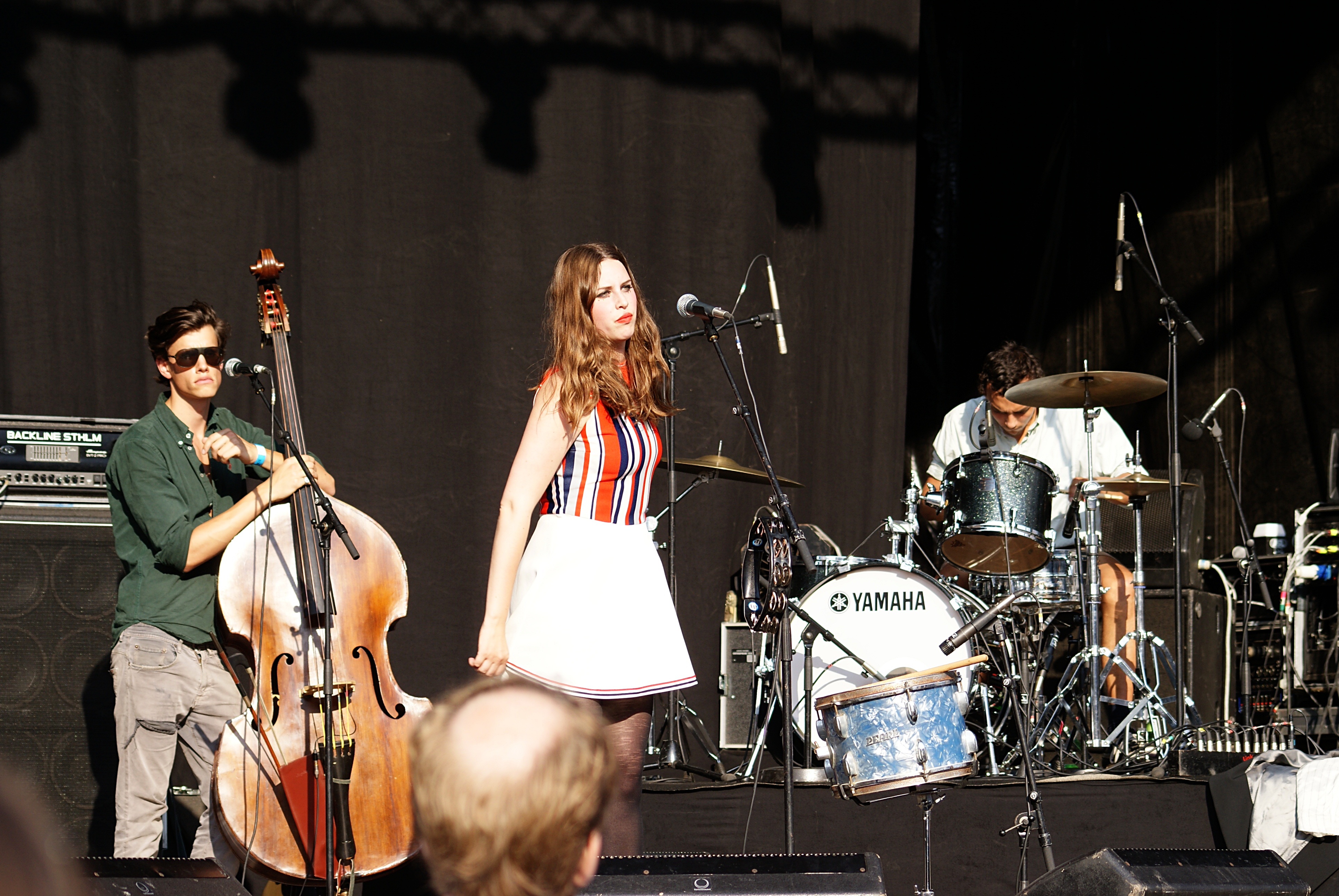 Fallulah på Roskildescenen på Stockholms Kulturfestival